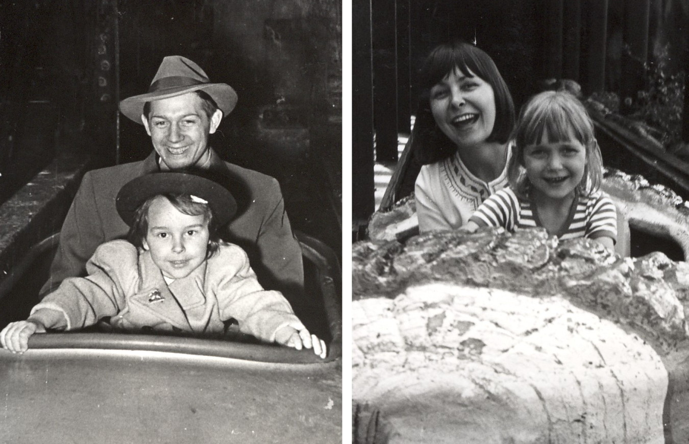 Kärlekstunneln på Gröna Lund 1953 och 1980 (far och dotter samt dotter och dottersdotter)